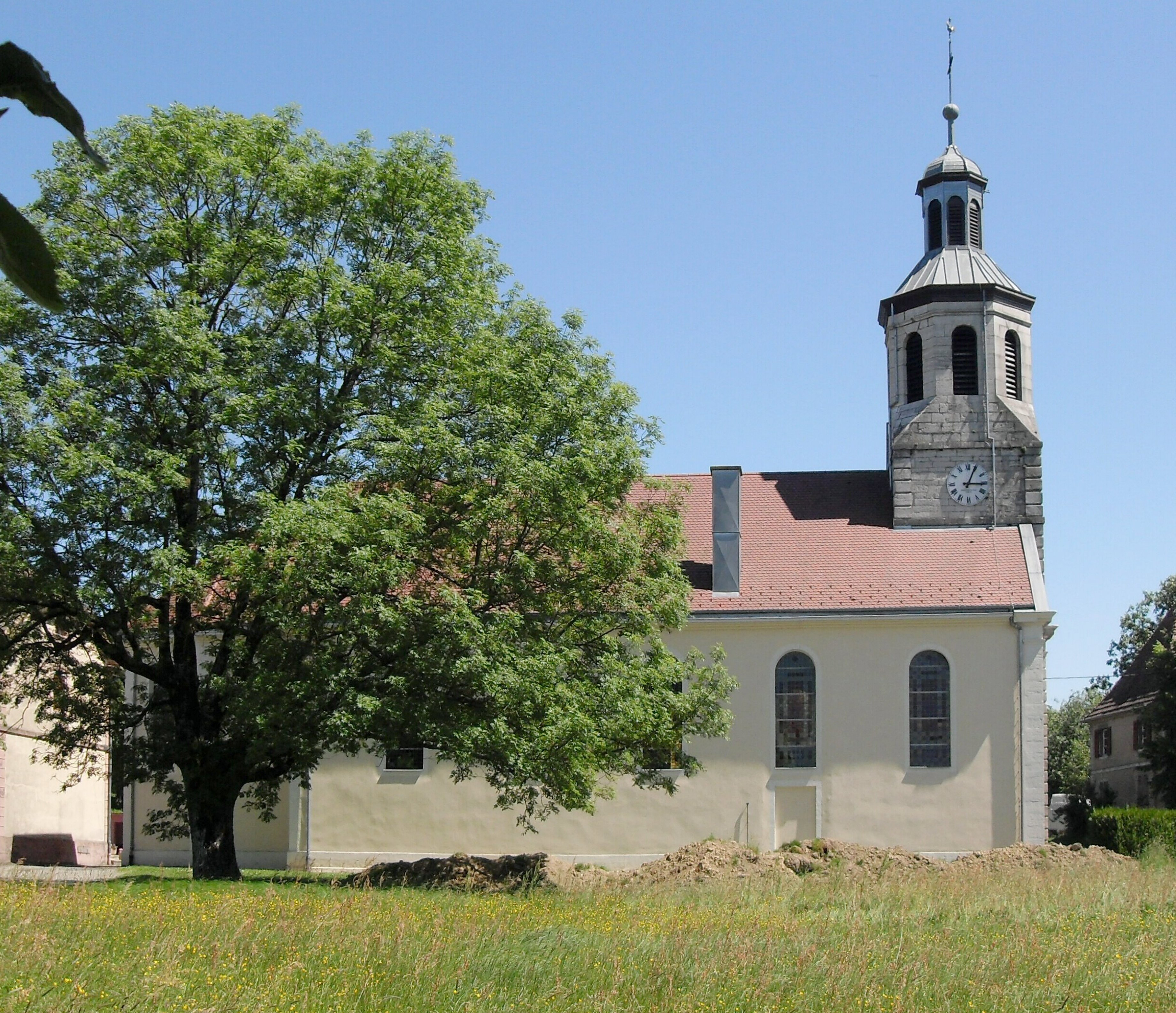 L'église Sainte-Odile à Chavannes-les-Grands